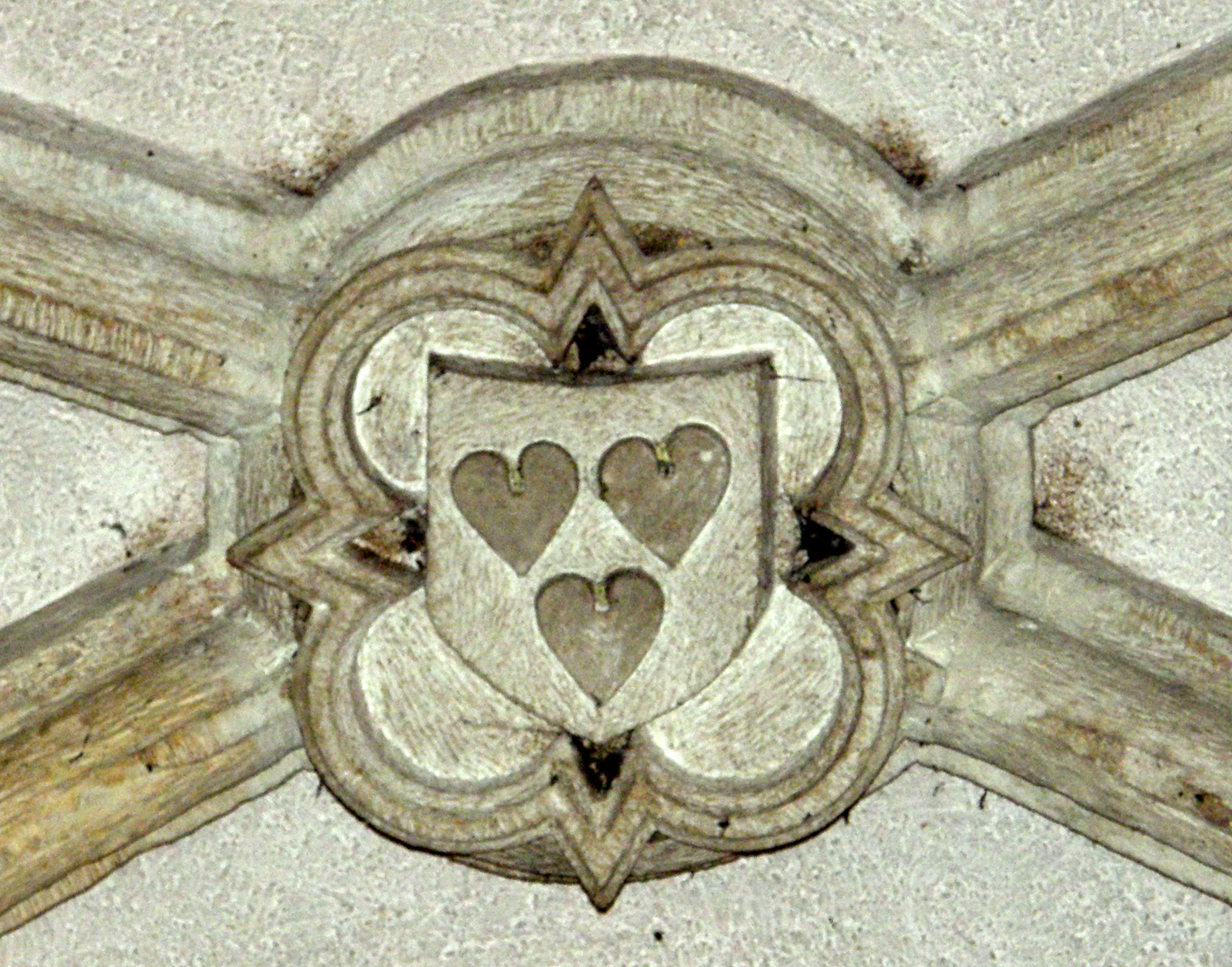 Schlussstee mat Wopen.